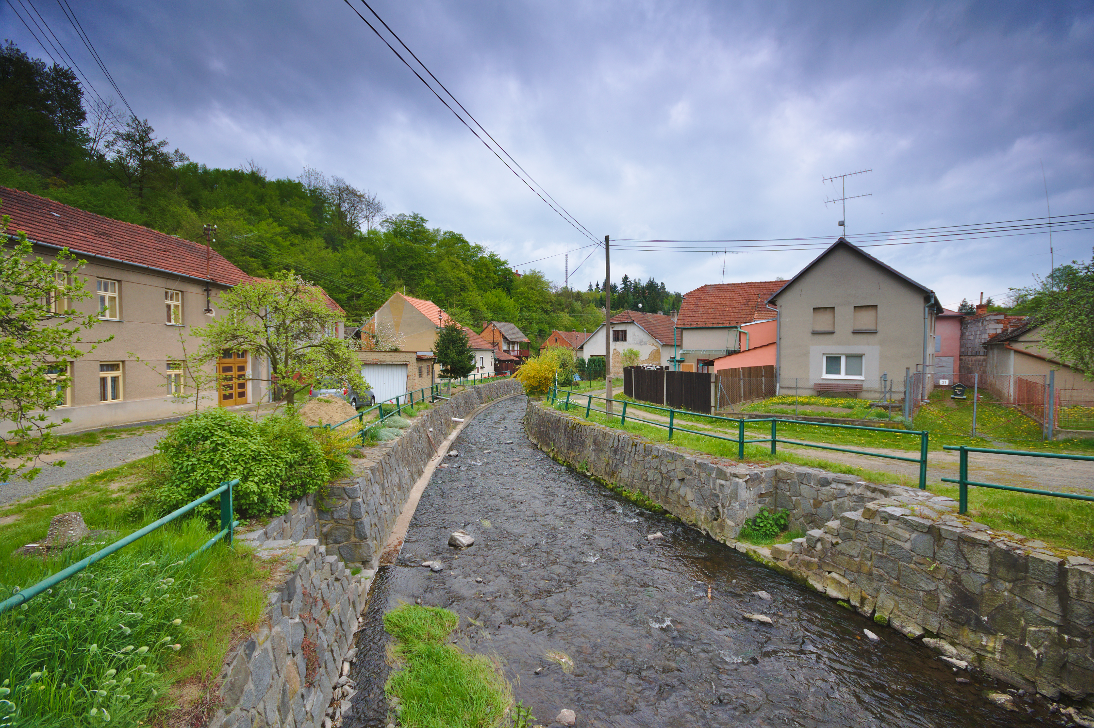 Hloučela v Hamrech, Plumlov, okres Prostějov